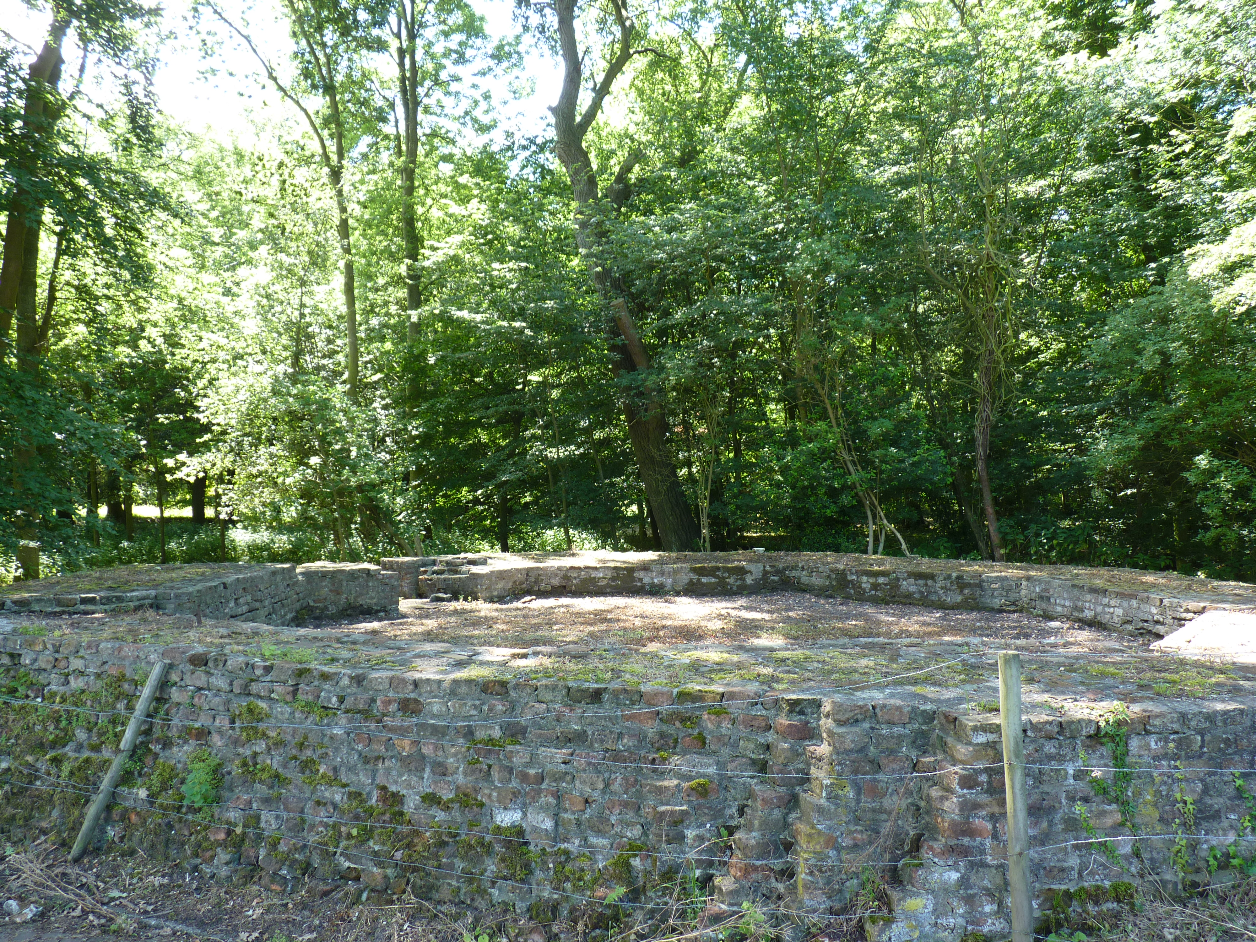 Oostvoorne Vuurtorenrestant